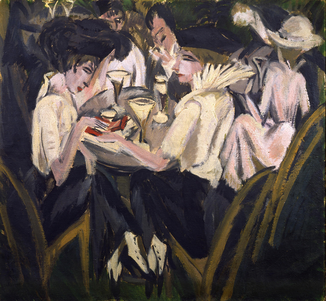 Ernst Ludwig Kirchner: Im Cafégarten, 1914, Öl auf Leinwand, 70,5 x 76 cm Brücke Museum Native nameBrücke-Museum BerlinLocationBerlinCoordinates52° 28′ 00.84″ N, 13° 16′ 24.96″ E Established15 September 1967Web page control : Q833759 VIAF: 129694437 ISNI: 0000 0001 2337 1451 LCCN: n79060020 GND: 2006007-5 SUDOC: 028659511 WorldCat institution QS:P195,Q833759